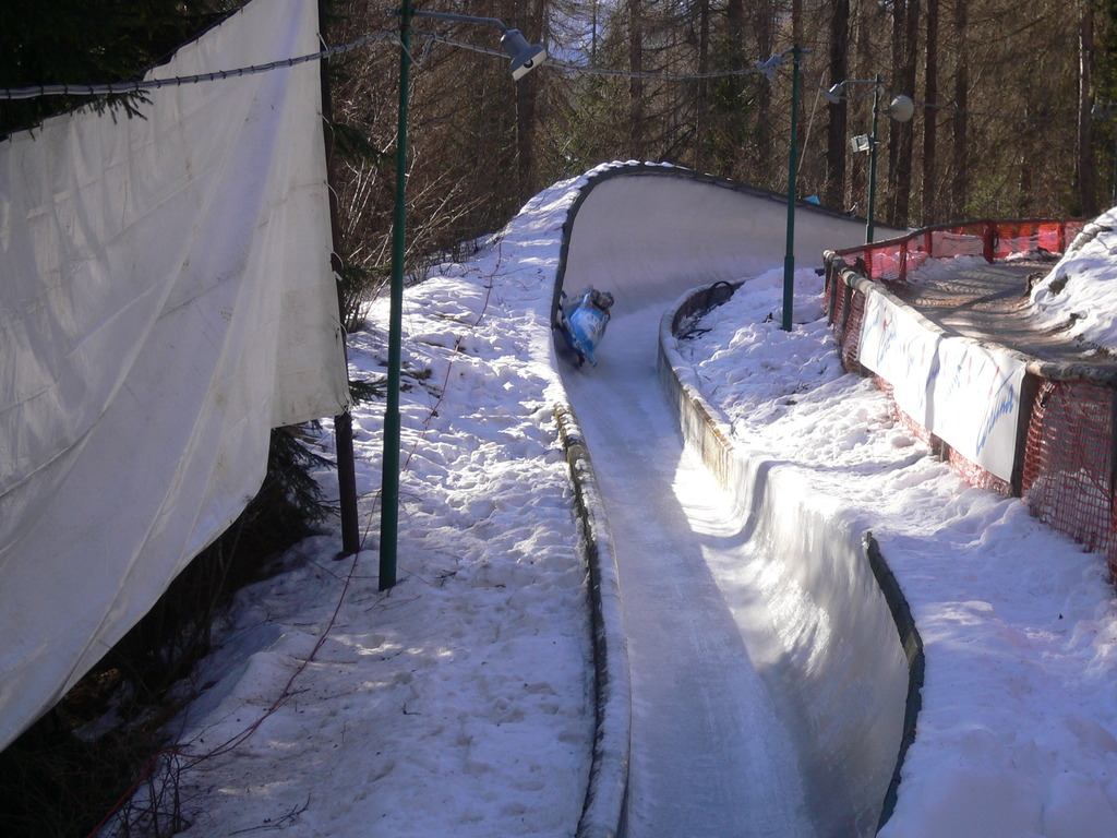 Photo d'un bobsleigh sur la piste d'Eugenio Monti à Cortina d'Ampezzo.